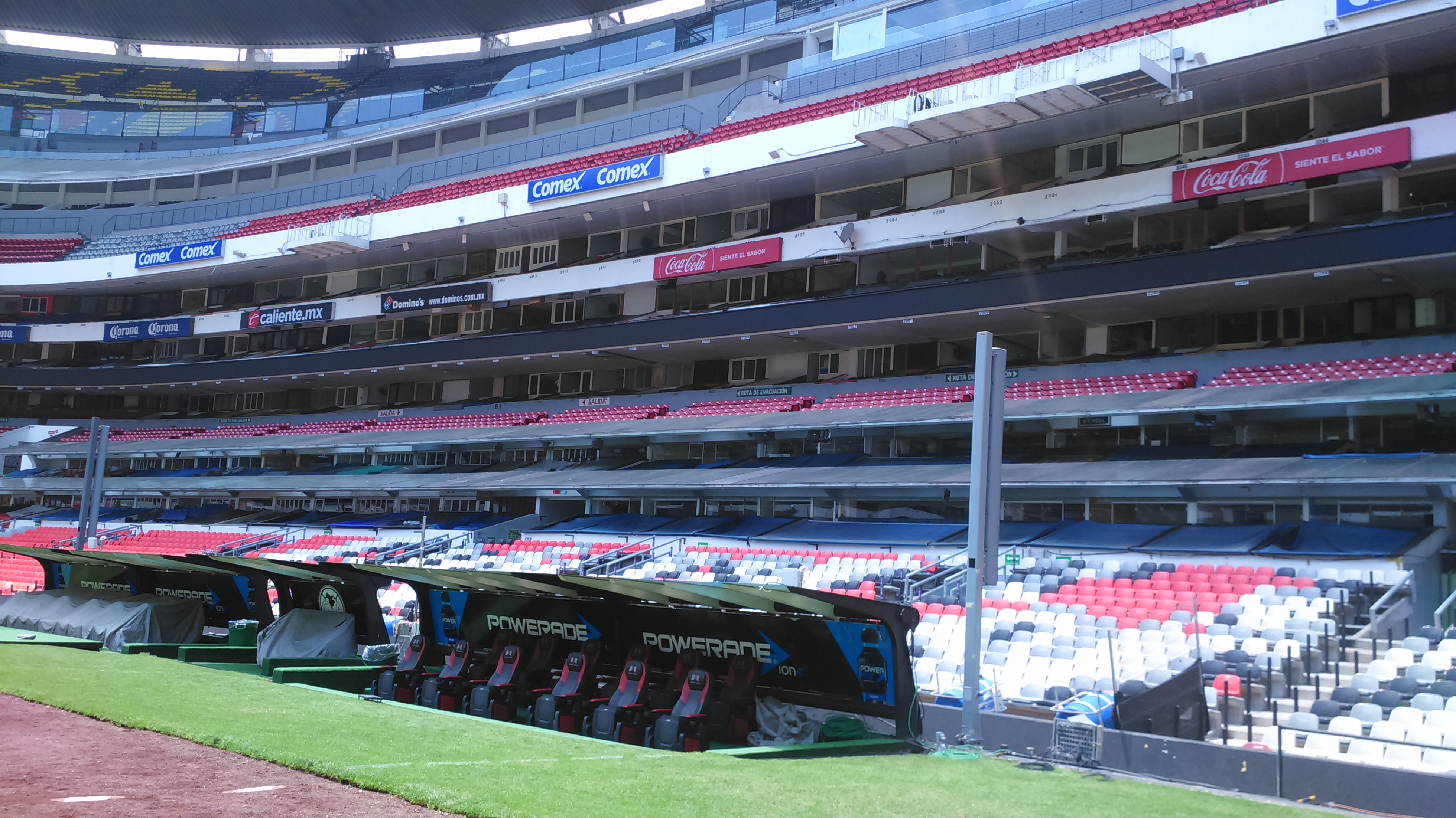 Zona de bancas y tribuna lateral